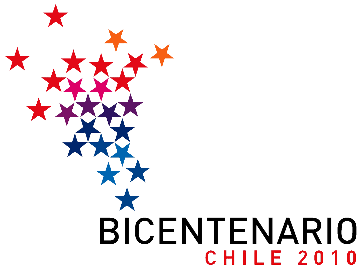 Logotipo oficial de las celebraciones del Bicentenario de Chile en 2010.